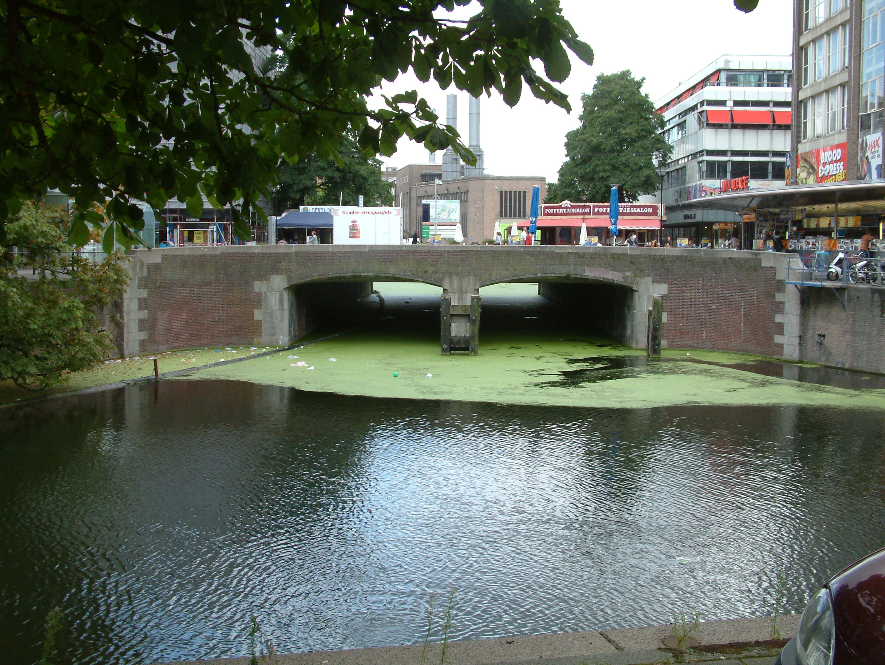 Bruggen over de Rotte, De Vlasmarktbrug, zuidkant